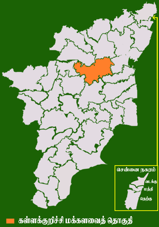 தமிழக வரைபடத்தில் உள்ள கள்ளக்குறிச்சி மக்களவைத் தொகுதி